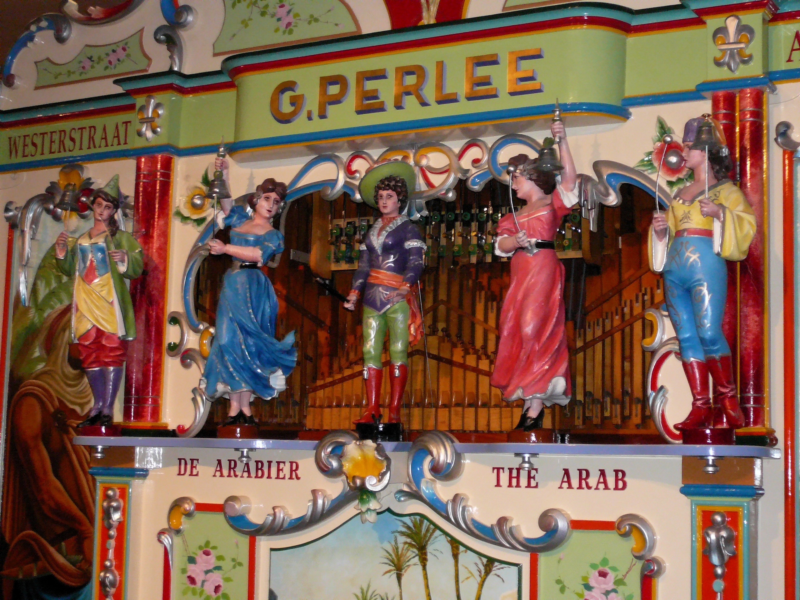 Street organ "de Arabier" by G. Perlee museum van pierement tot speelklok (142)